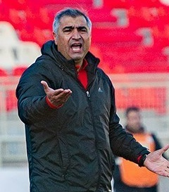 دیدار تیم های فوتبال تراکتور و نفت مسجد سلیمان